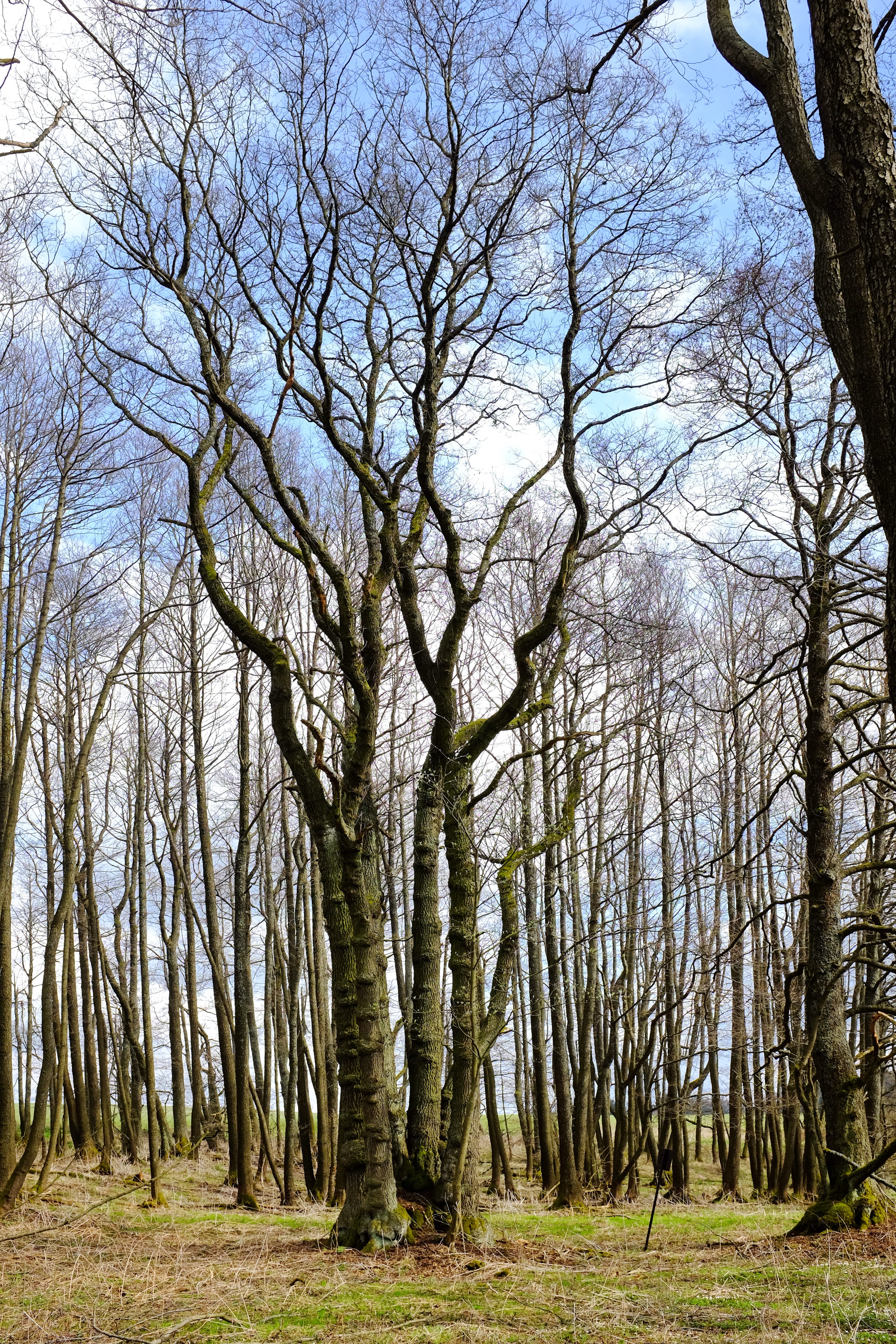 Památný strom - Beranovská olše, Beranovka, část města Teplá, okres Cheb